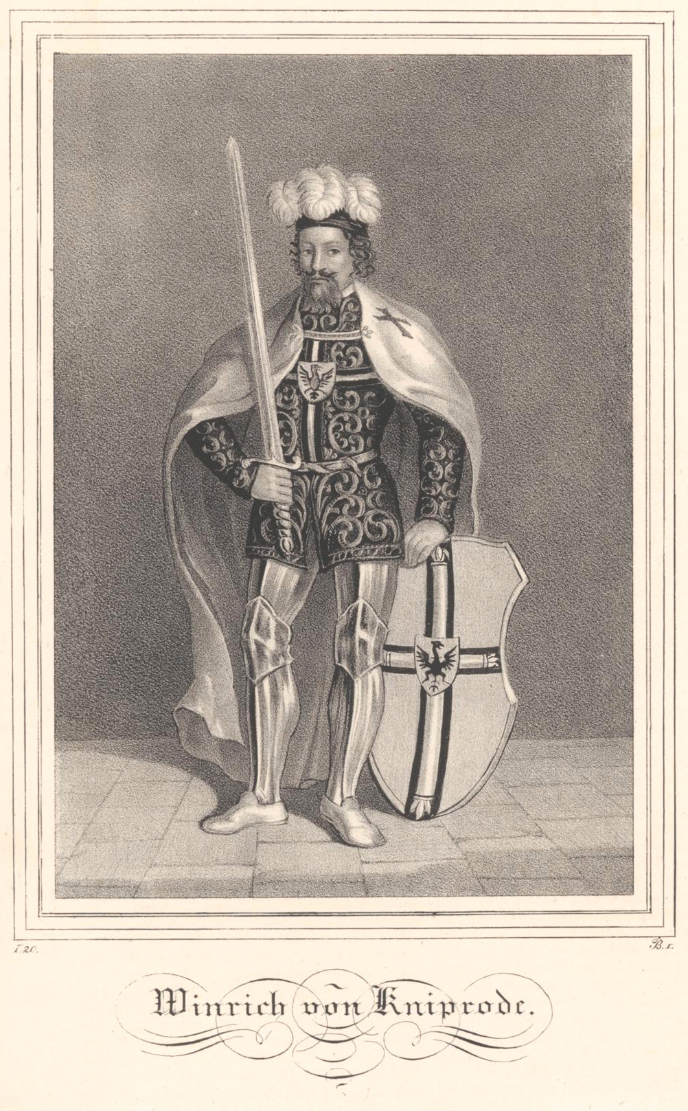 Winrich von Kniprode, Lithographie : 12 x 18 cm, Heinrich Wilhelm Teichgräber